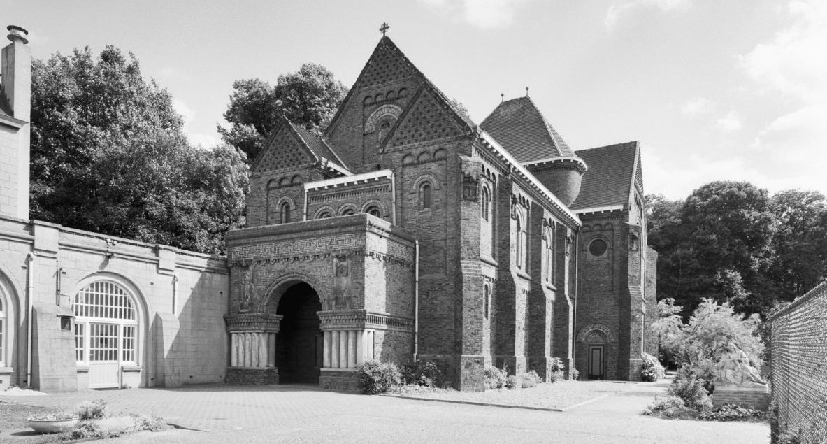 Klooster Van De Zusters Van De Voorzienigheid: Overzicht zuidwestgevel met voorhal, kloosterkapel (opmerking: Gefotografeerd voor Monumenten In Nederland Limburg)